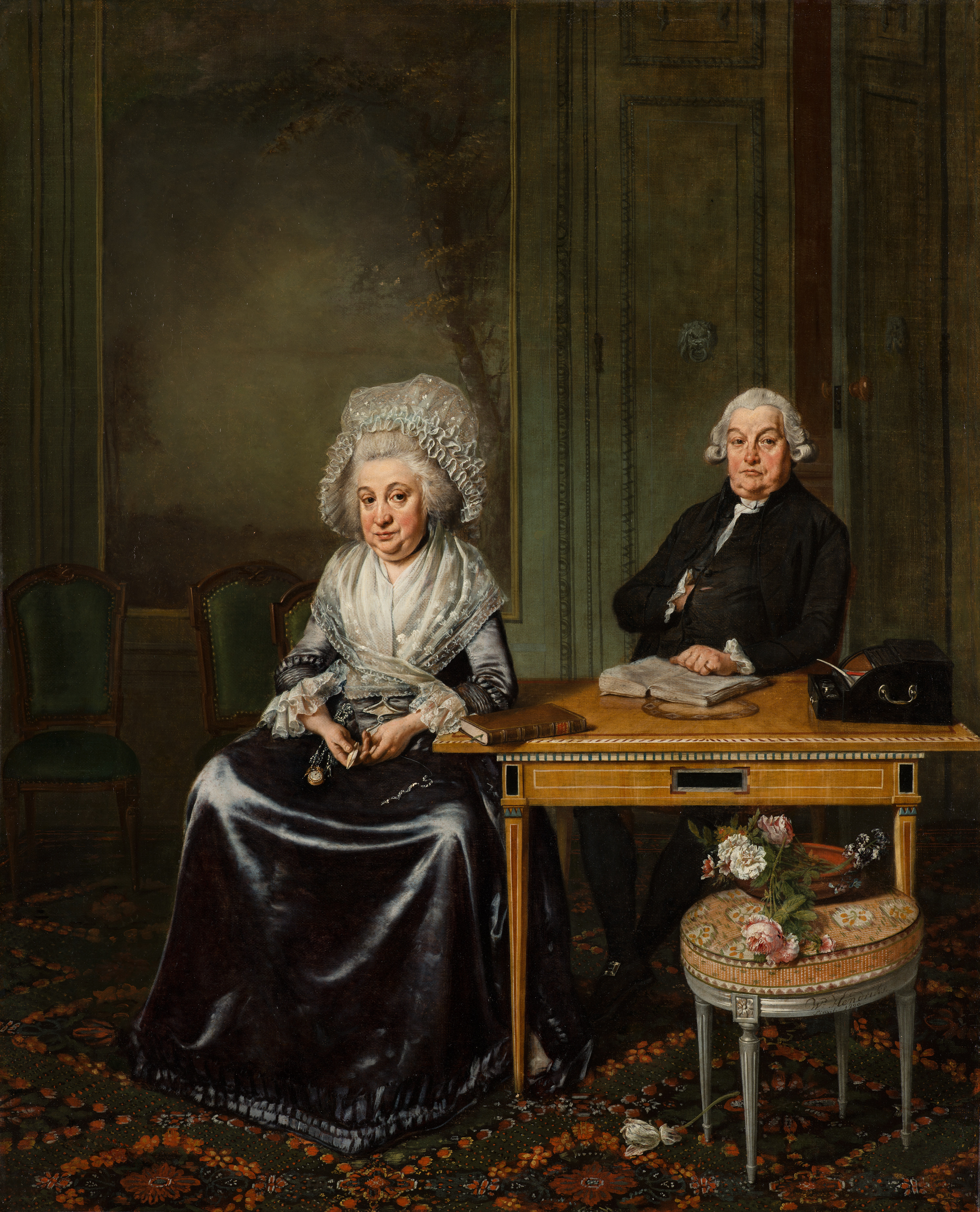 Portret van Jacob Feitama (1726-1797) en zijn echtgenote Elisabeth de Haan (1735-1800).